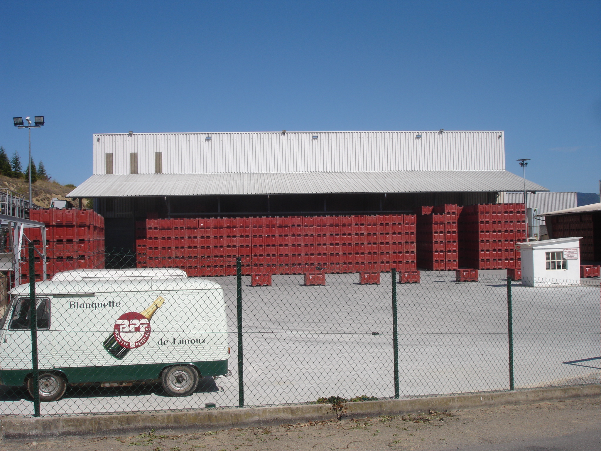 France, Aude (11), Limoux, Coopérative Sieur d'Arques, réception vendange